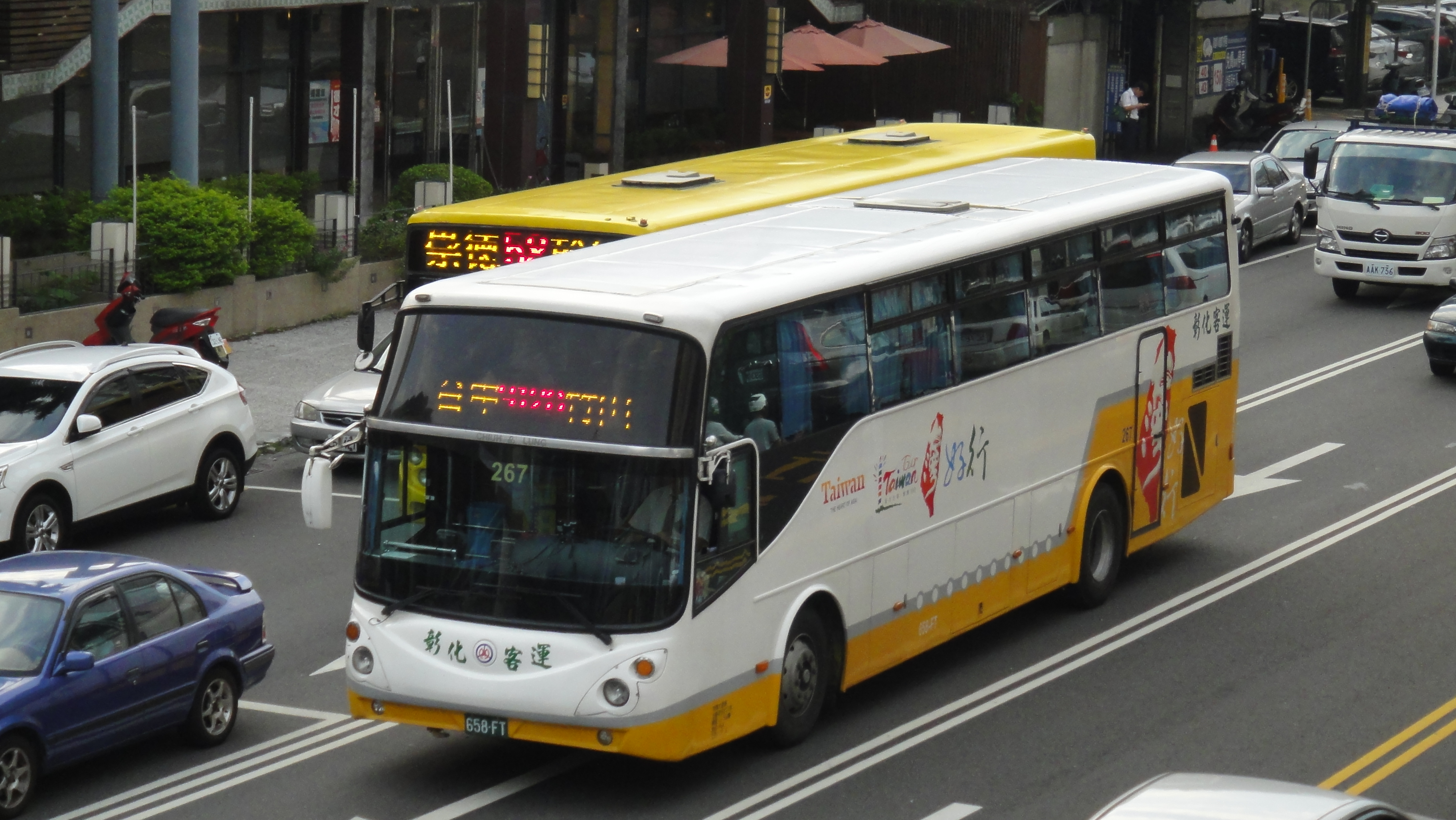 彰化客運日野大客車658-FT，台灣好行車輛。